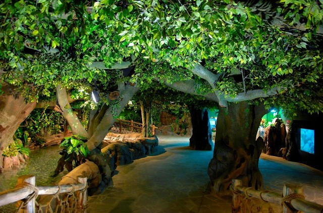 Экспозиция "Тропический лес" в sochiaquarium